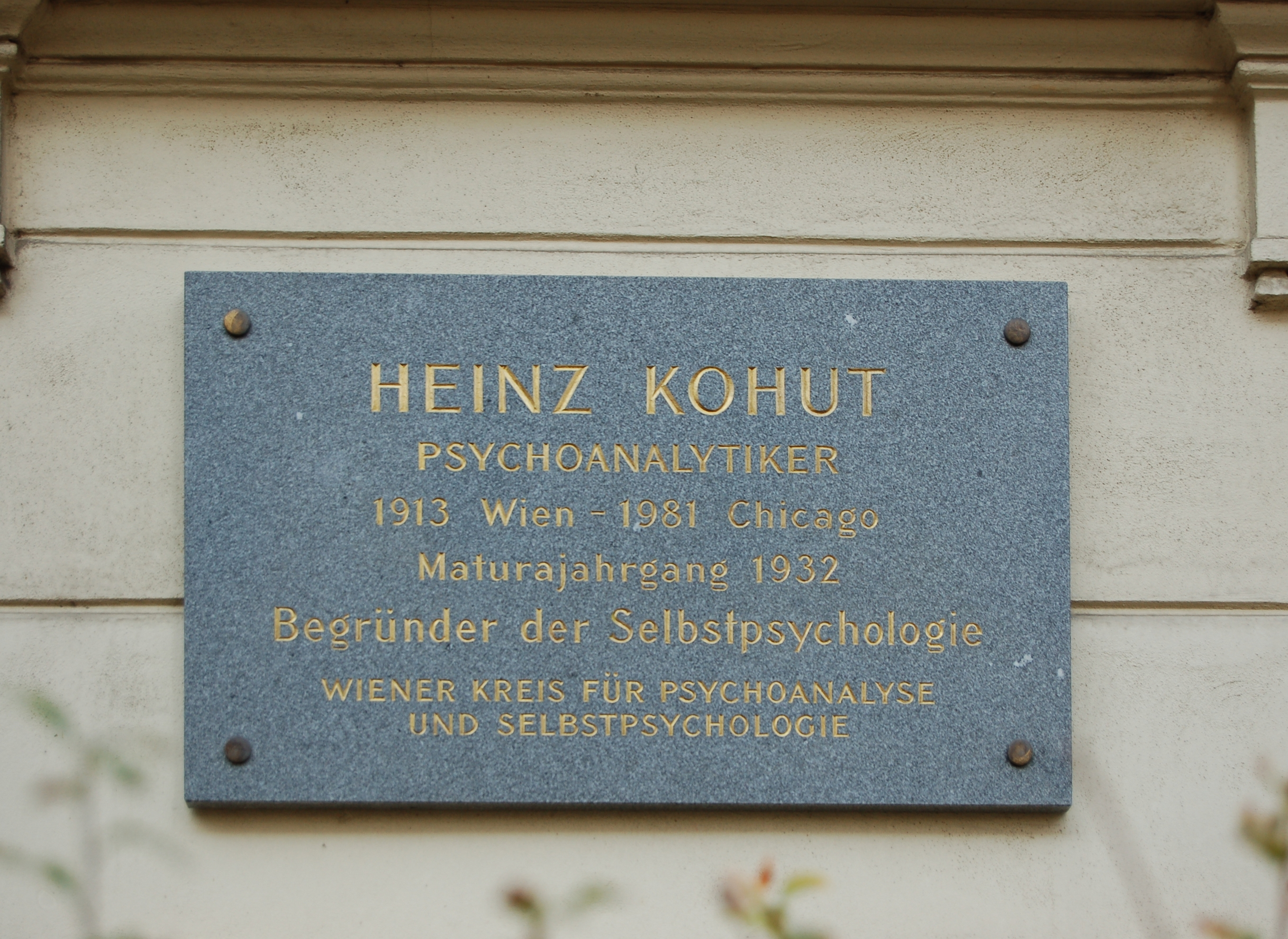 Der Altbau des Bundesgymnasiums Döbling in der Gymnasiumstraße 83 in Wien.